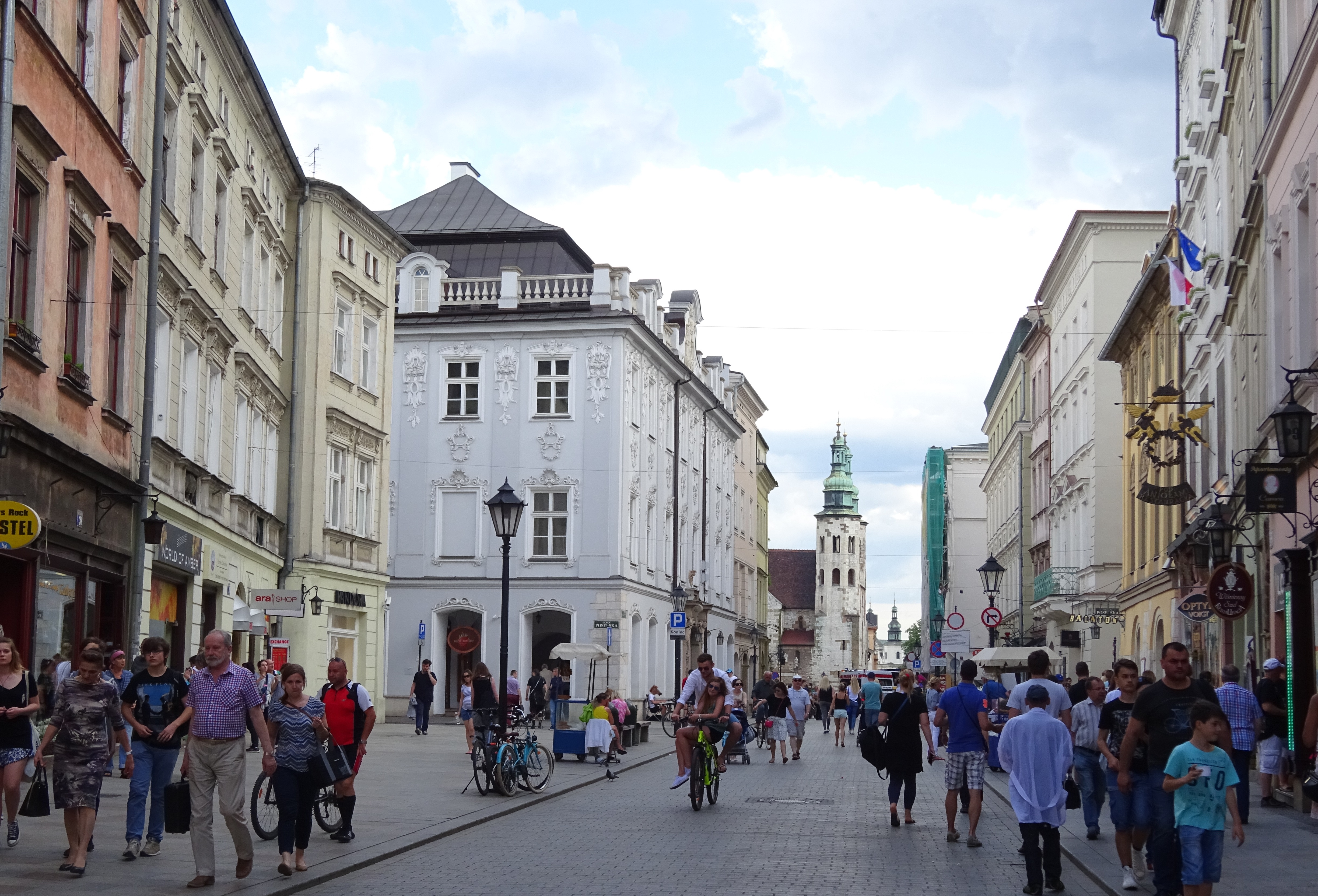 Widok ulicy Grodzkiej od skrzyżowania z ulicą Poselską na południe.